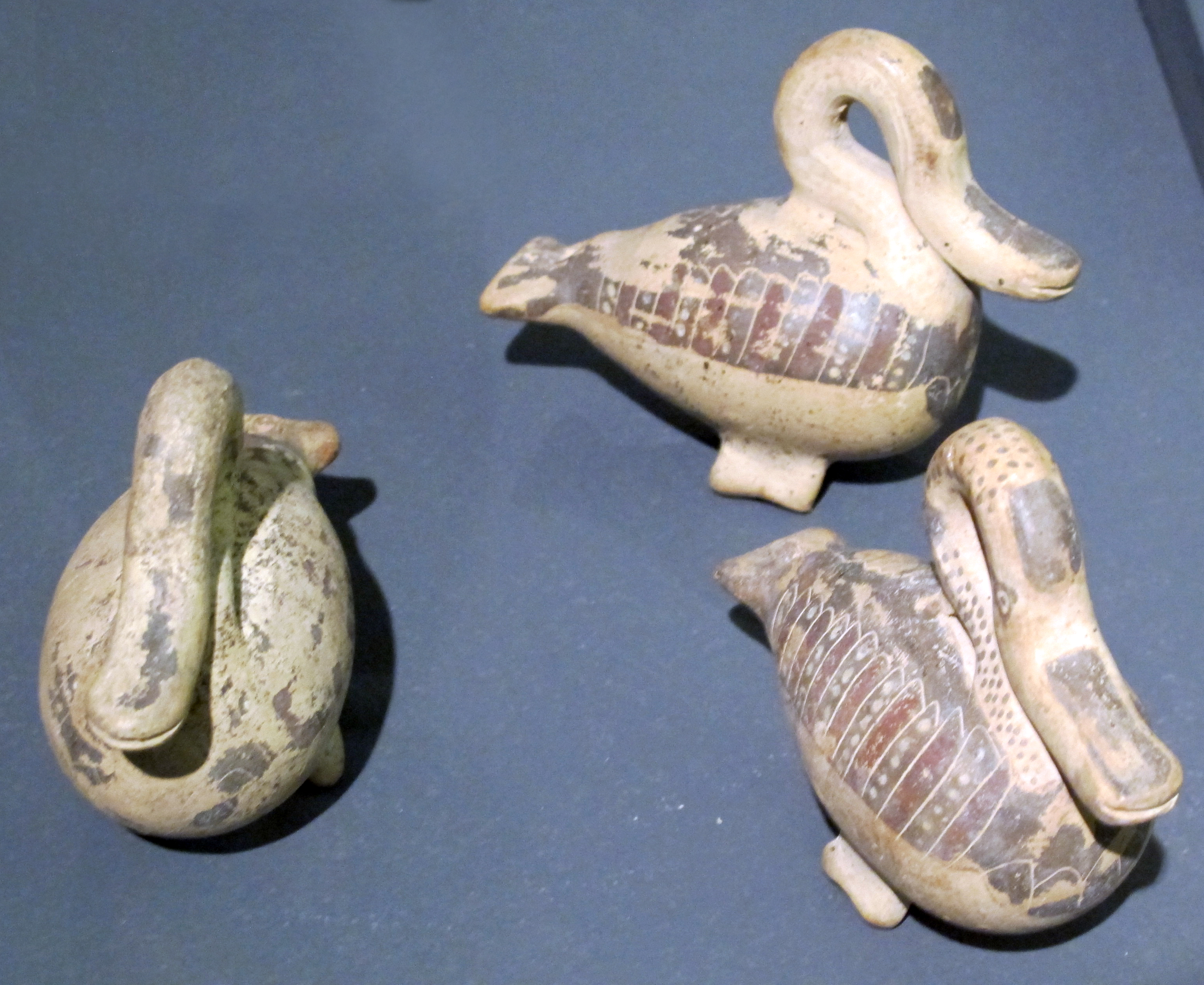 Populonia, poggio della porcareccia, balsamari a cigno, 700-550 ac. ca.